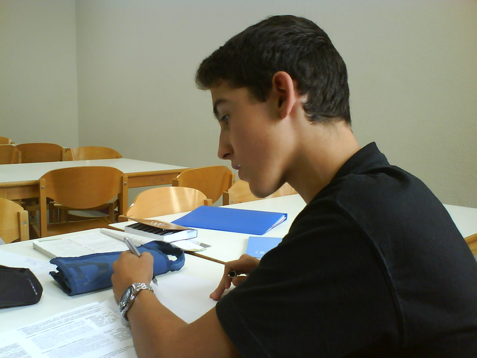 techa en train de travailler